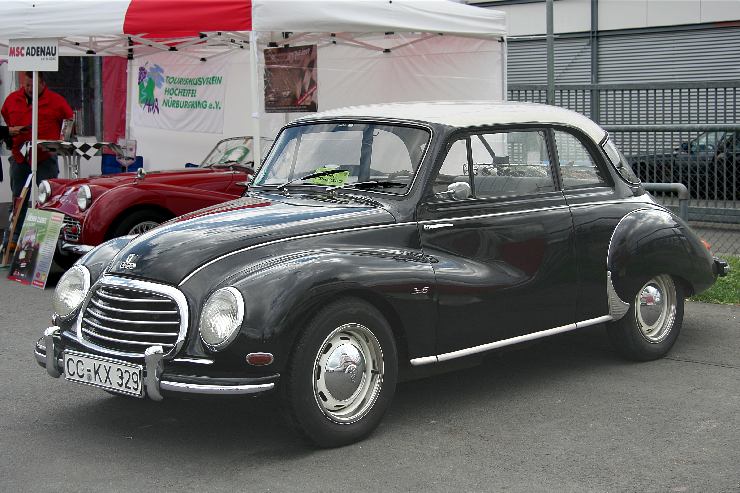 DKW F 93, Modelljahr 1955/56, 3-Zylinder-Zweitaktmotor (auf dem Fahrerlagerparkplatz des Nürburgrings)